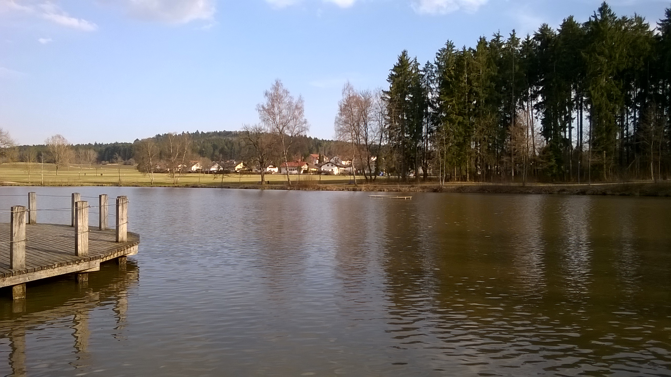 Salinensee in Baden-Württemberg, Deutschland